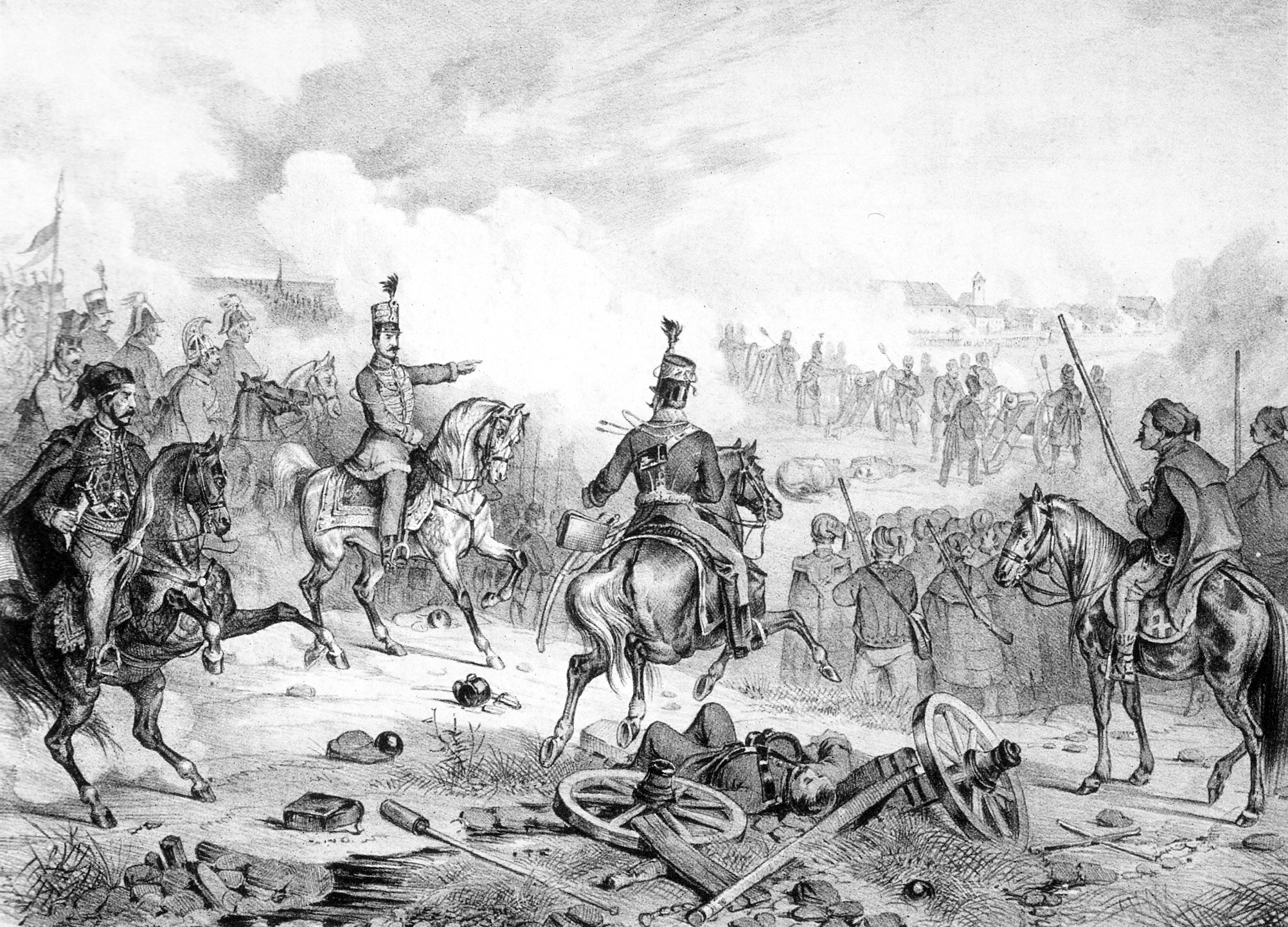 A mosoni ütközet 1848. december 18-án Görgei Artúr és Josip Jelačić csapatai között. Az Armee-Bulletin 3. lapja